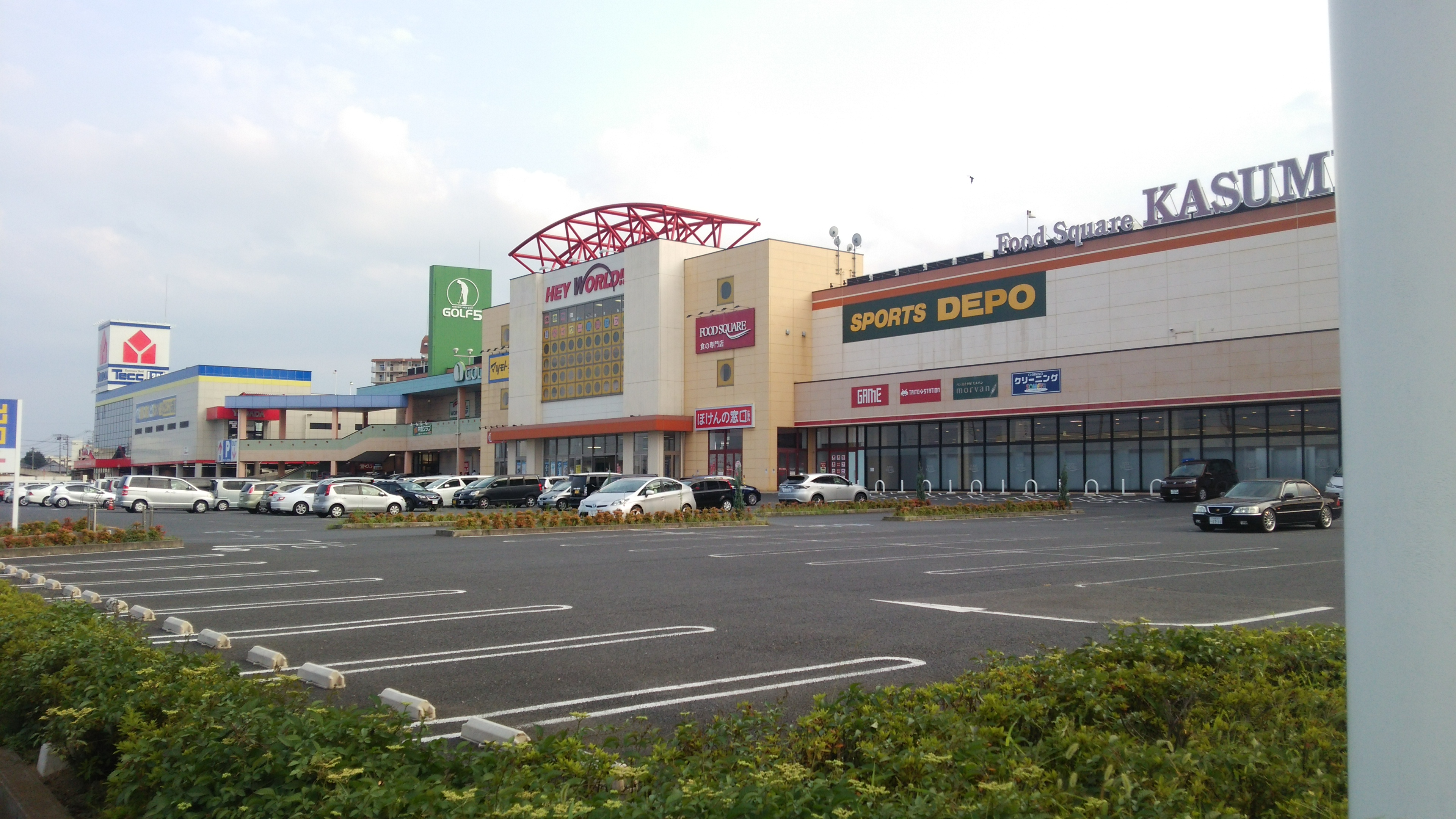 埼玉県北本市の「HEY WORLD!!」というショッピングセンターの建物全景